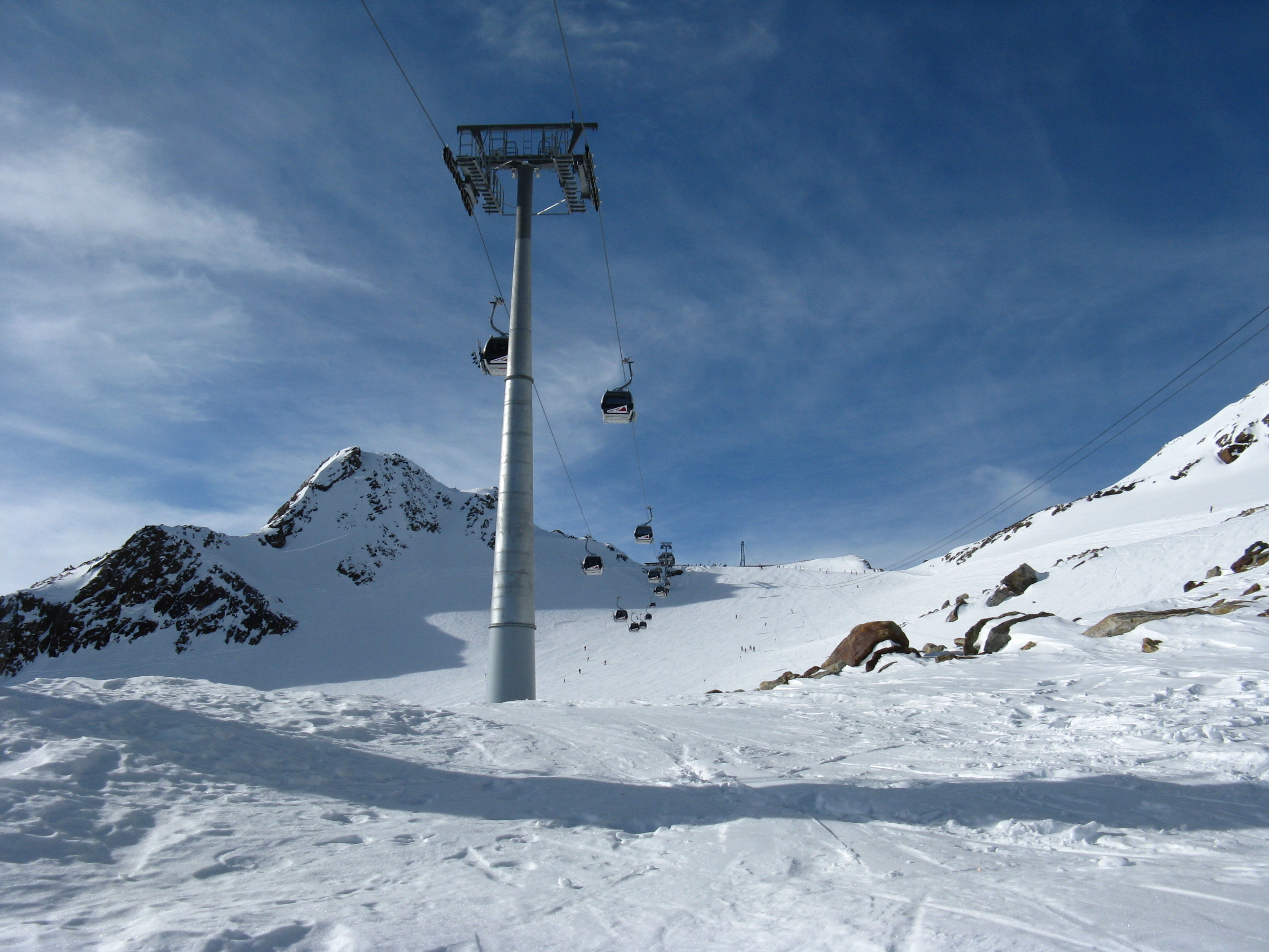 שלג באתר הסקי זולדן